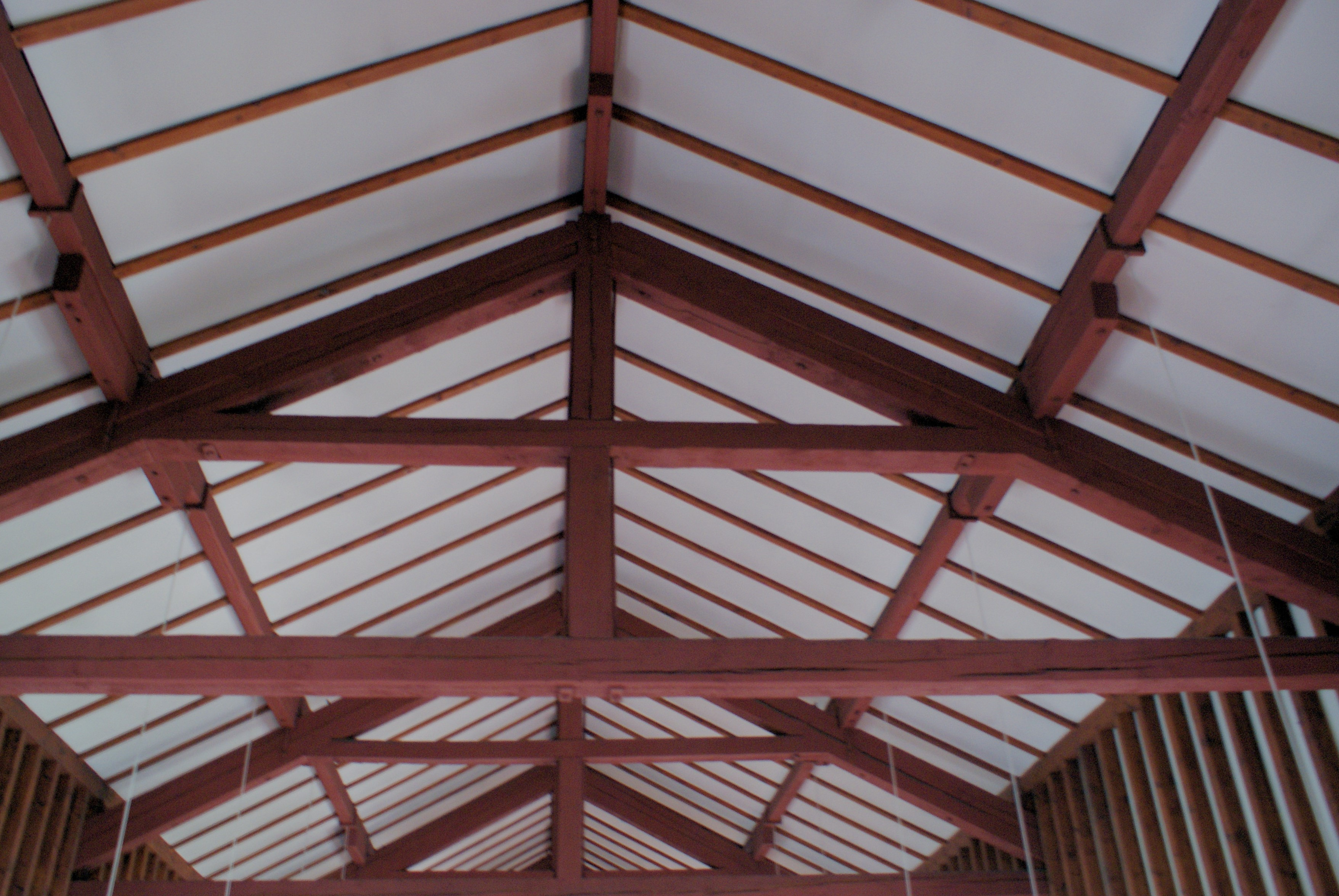 St. Marien in Dorsten-Hervest, Landkreis Recklinghausen, Nordrhein-Westfalen, Deutschland